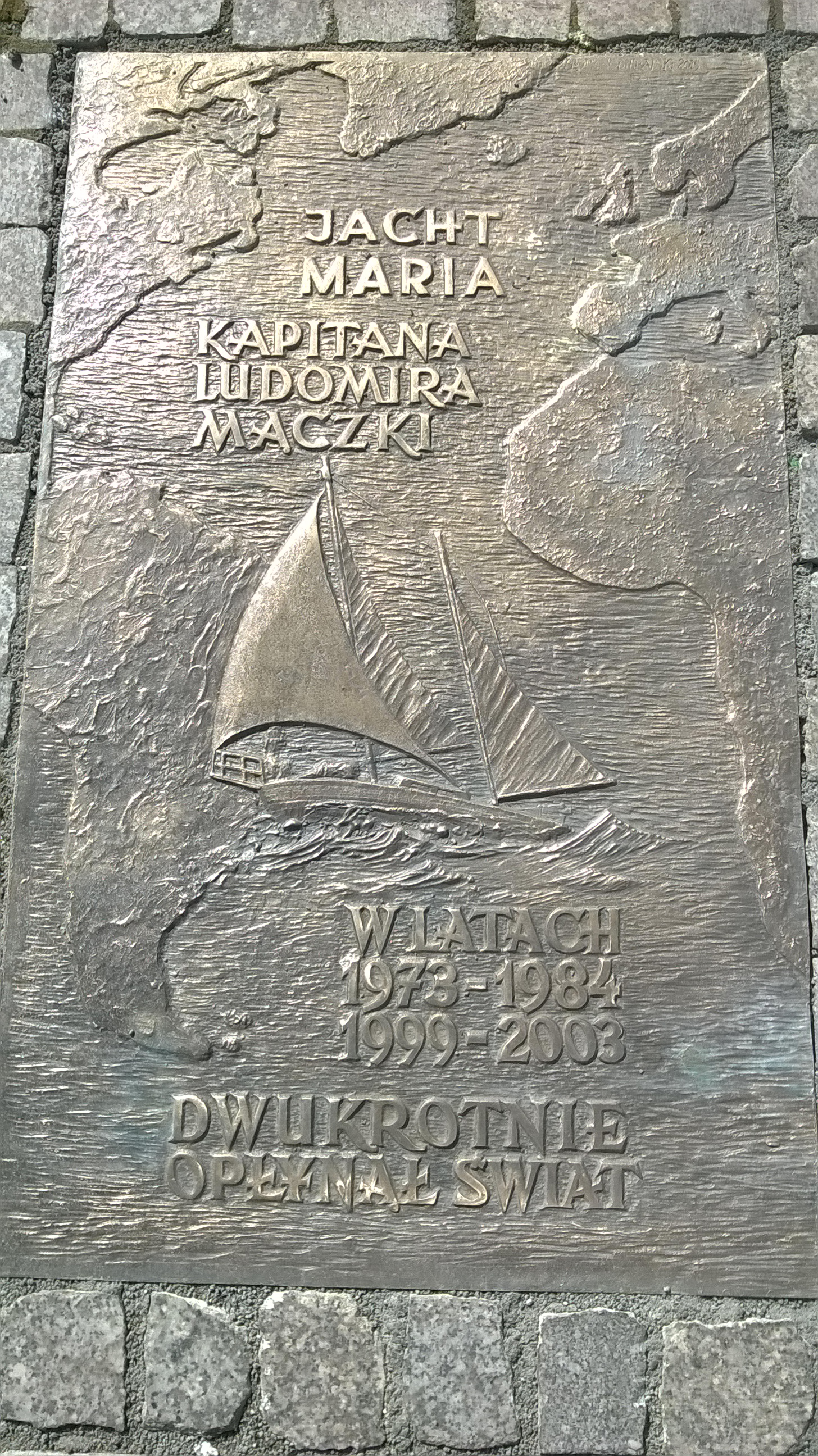 Tablica pamiątkowa w Alei Żeglarzy w Szczecinie, poświęcona łódce SY "Maria" kpt. Ludomira Mączki, jachtowi który dwukrotnie opłynął świat